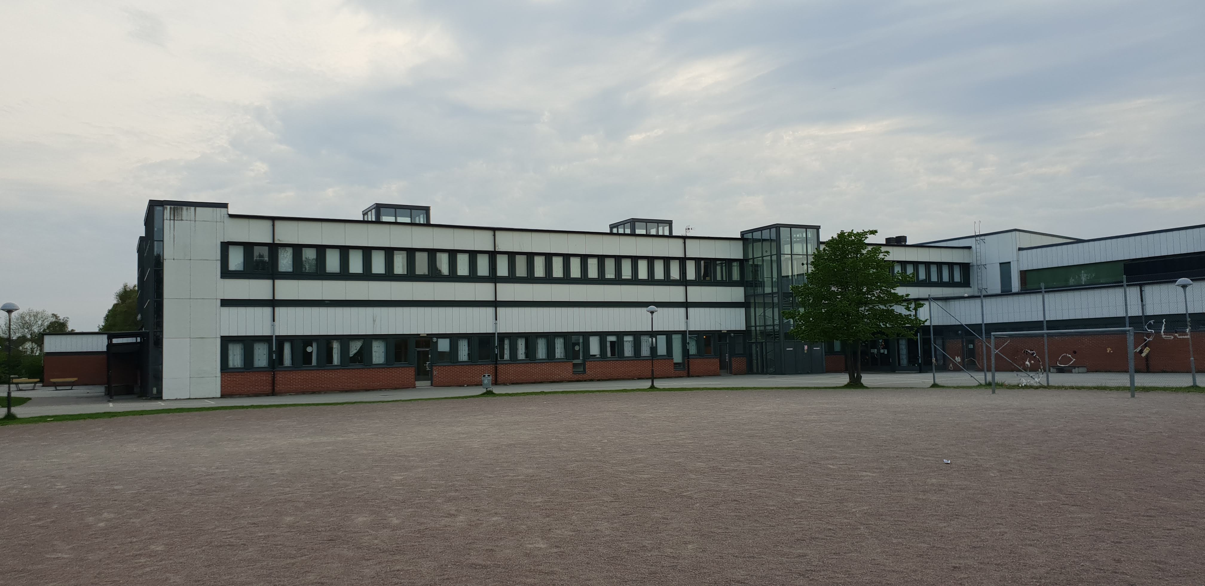 En sida av Dalslundskolan samt grusplanen utanför